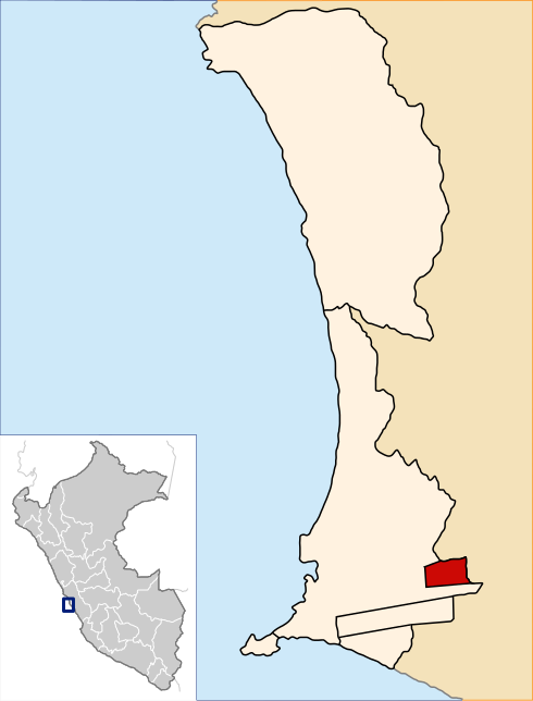 Carmen la Legua.